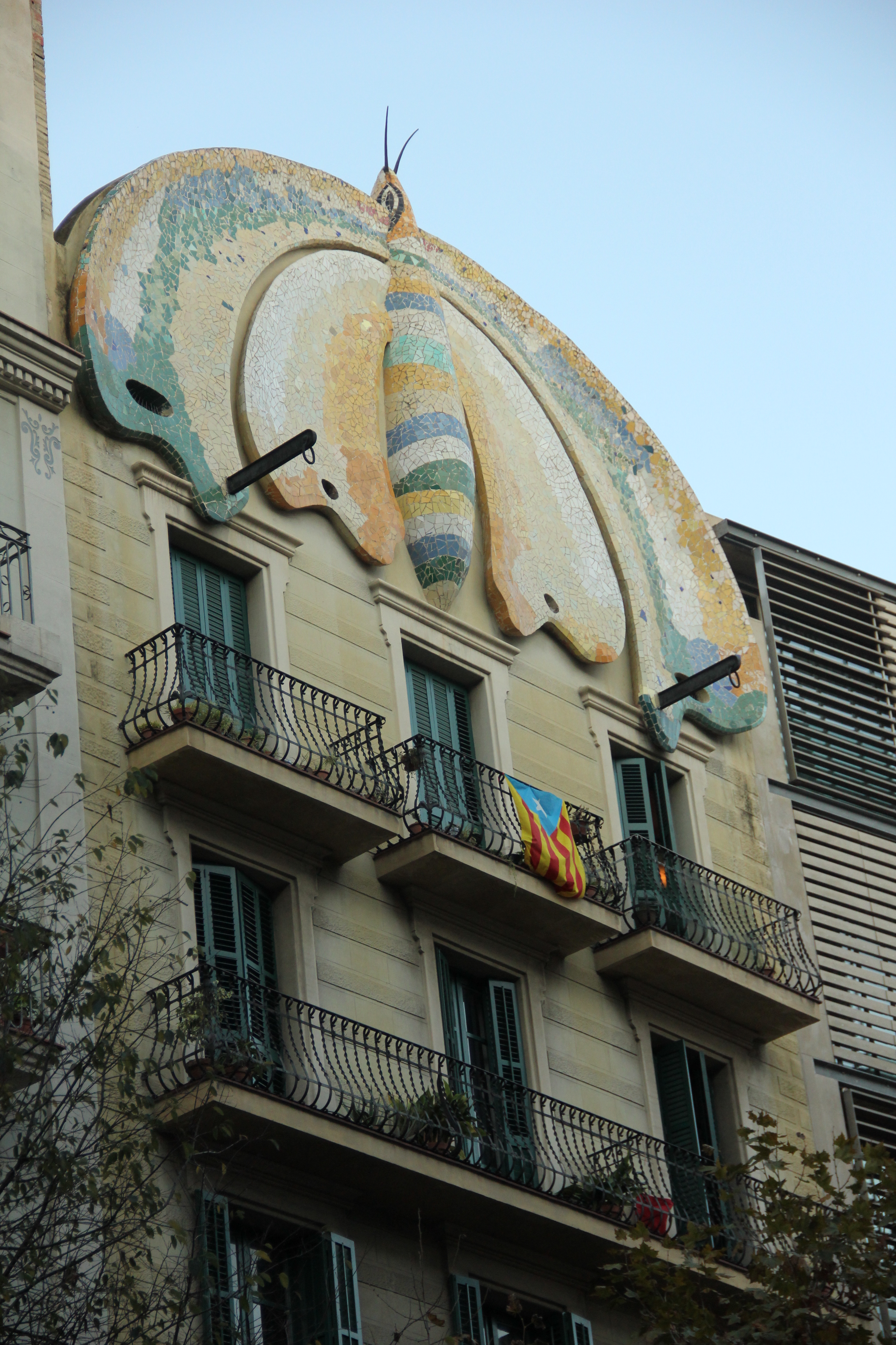 Casa Fajol a Barcelona construïda per Josep Graner i Prat